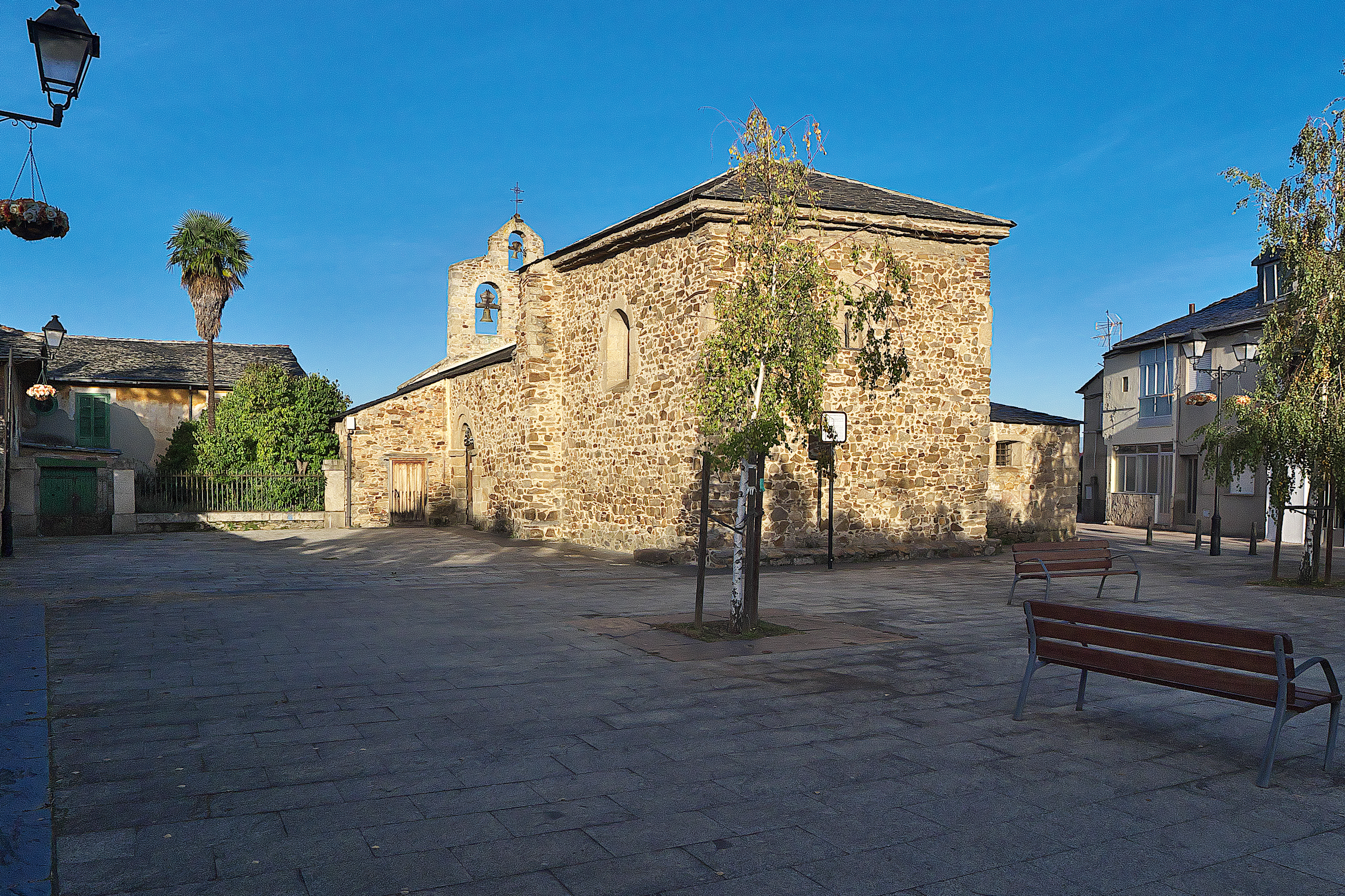 En primer plano, el ábside cuadrado (s. X). La altura de este ábside era la misma que la de la nave, rebajada en el siglo XVII.